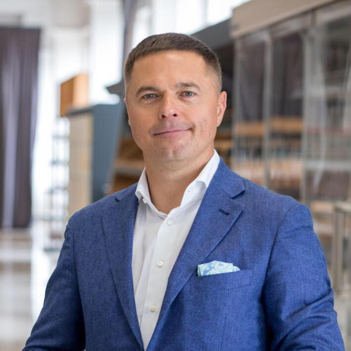 modern-expo group